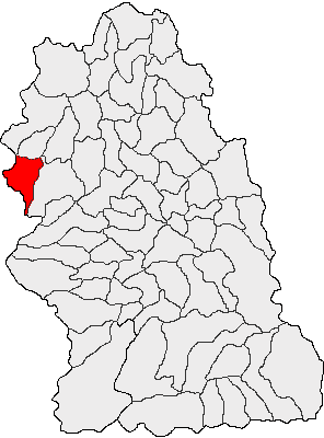 Categorie:Hărţi ale judeţului Hunedoara